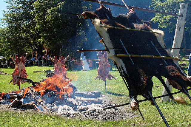 Con varas de fierro atravesadas, el animal ya abierto se posa sobre una especie de arco de futbol